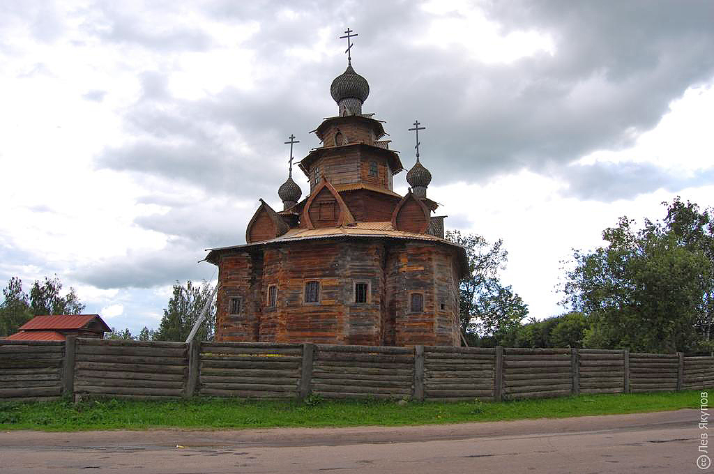 Деревянная Воскресенская церковь